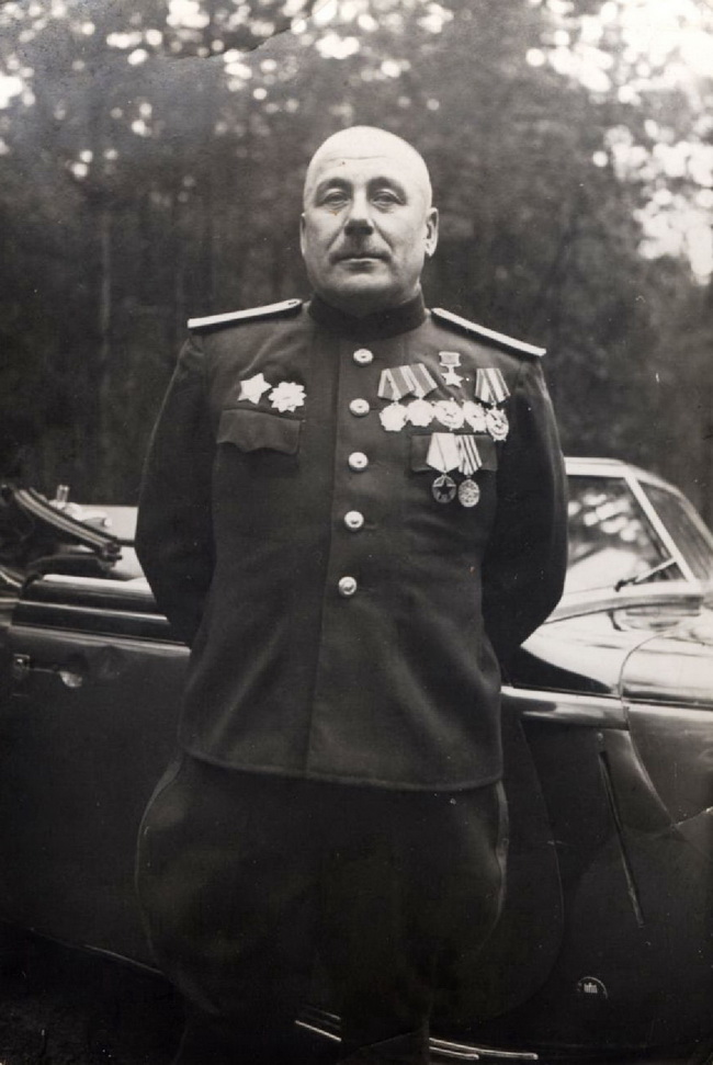 Герой Советского Союза Федор Андреевич Волков